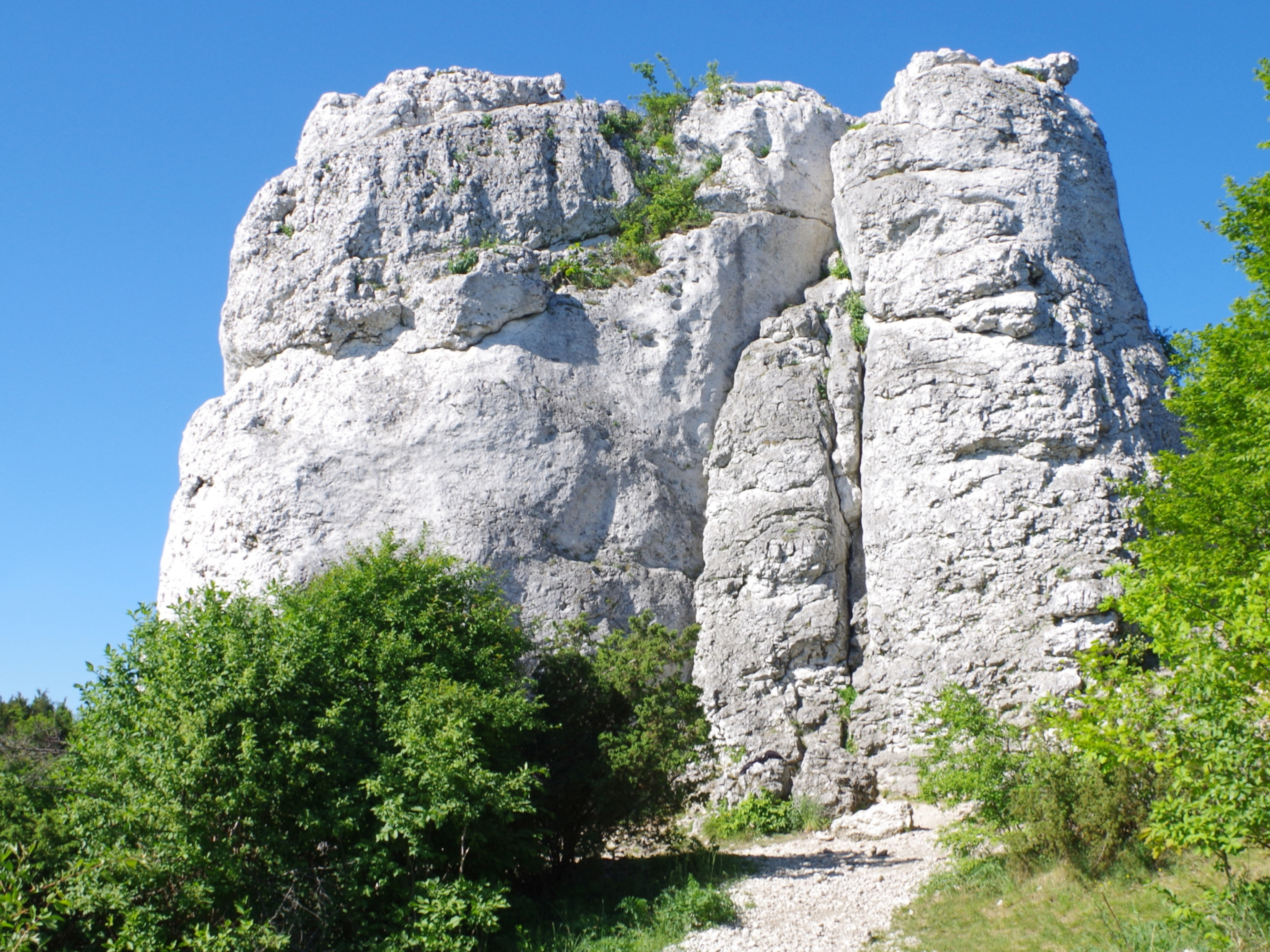 Skały Rzędkowickie. Zegarowa Turnia